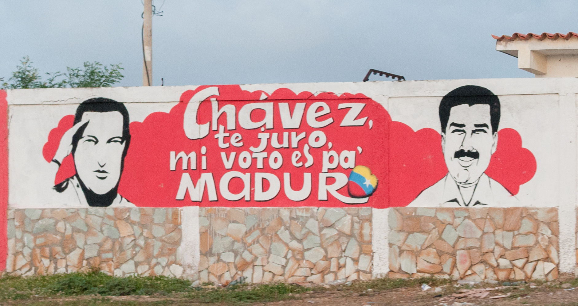 Maduro and Chavez in the wall